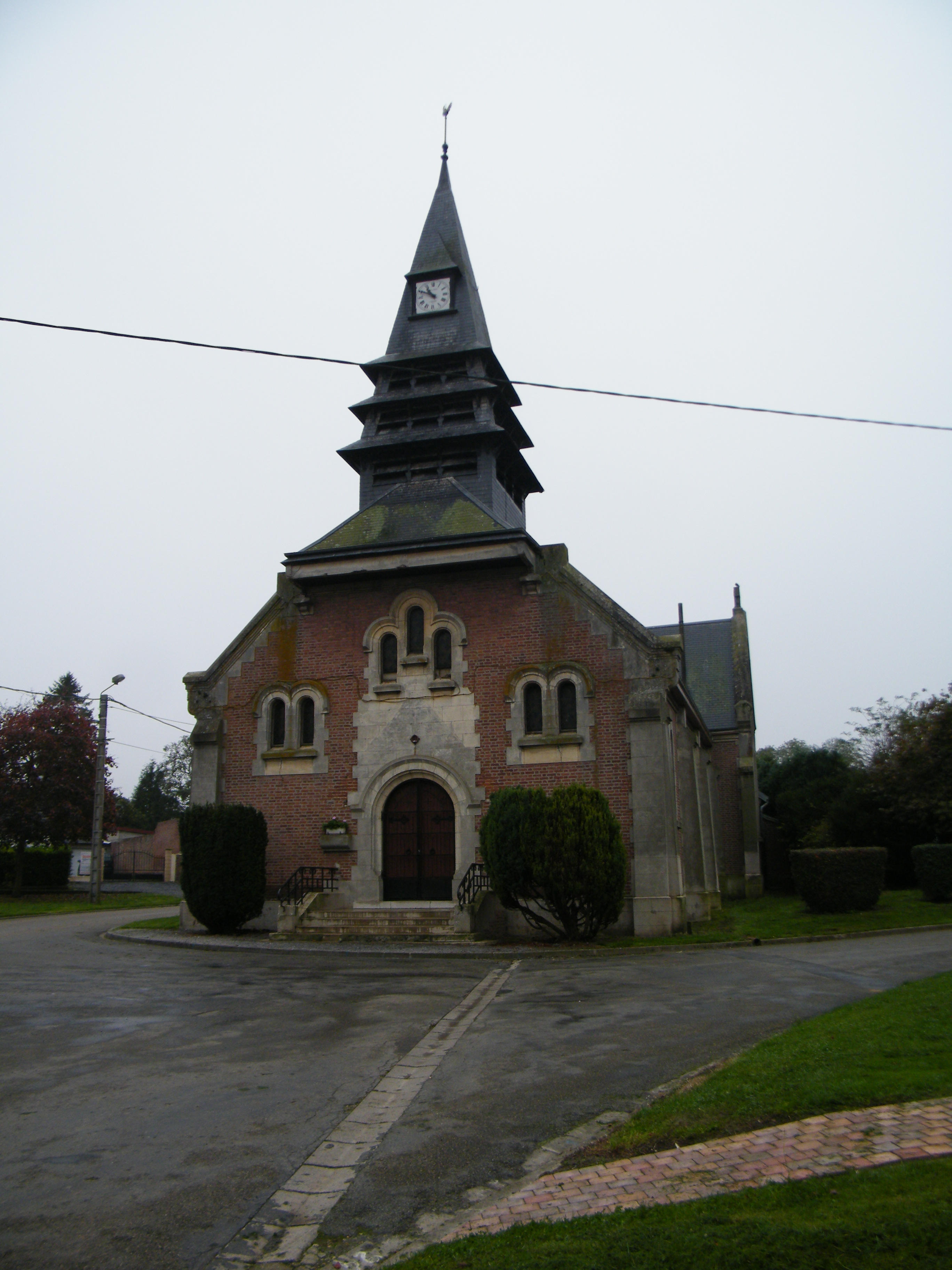 L'église de Vrély (Somme), France.